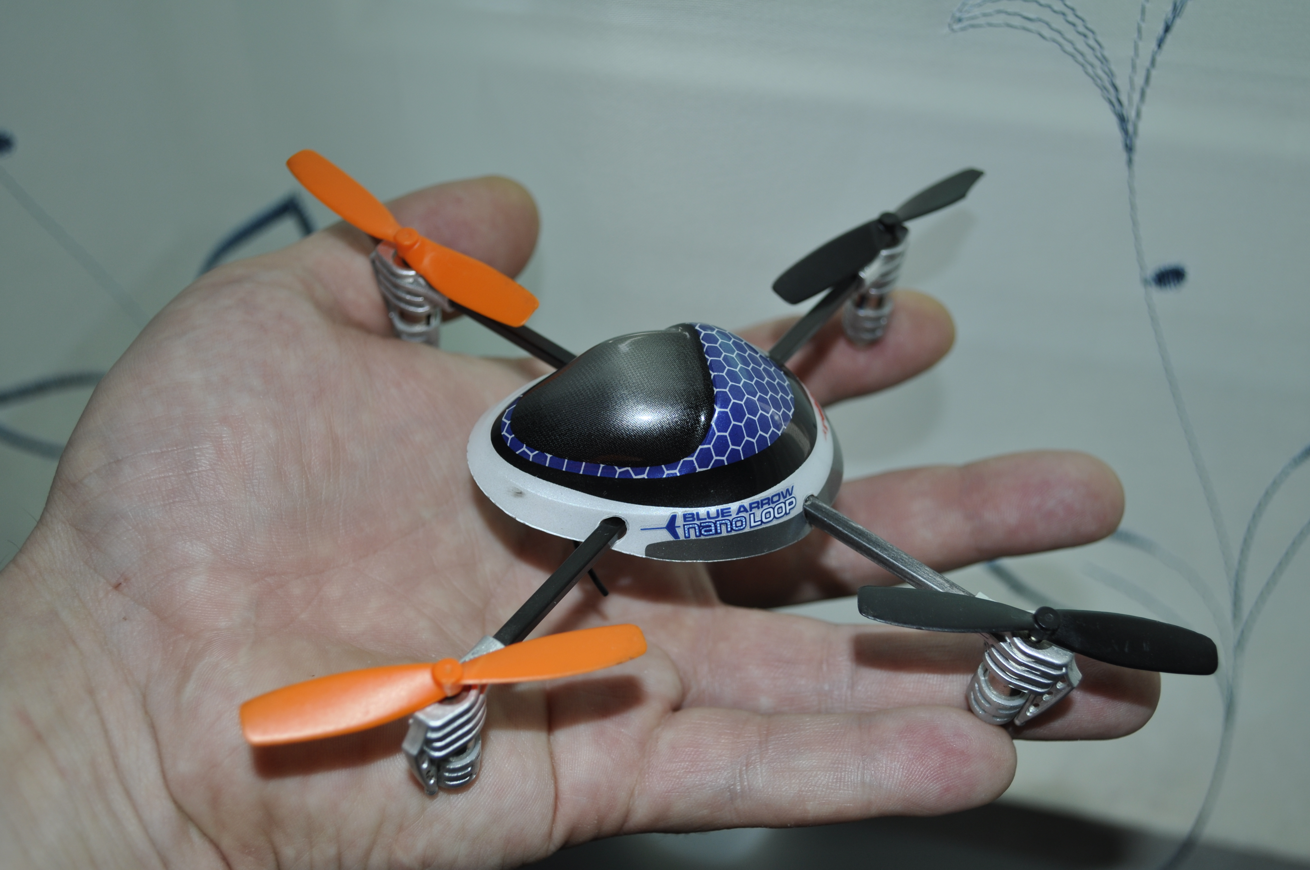 Квадрокоптер на ладони